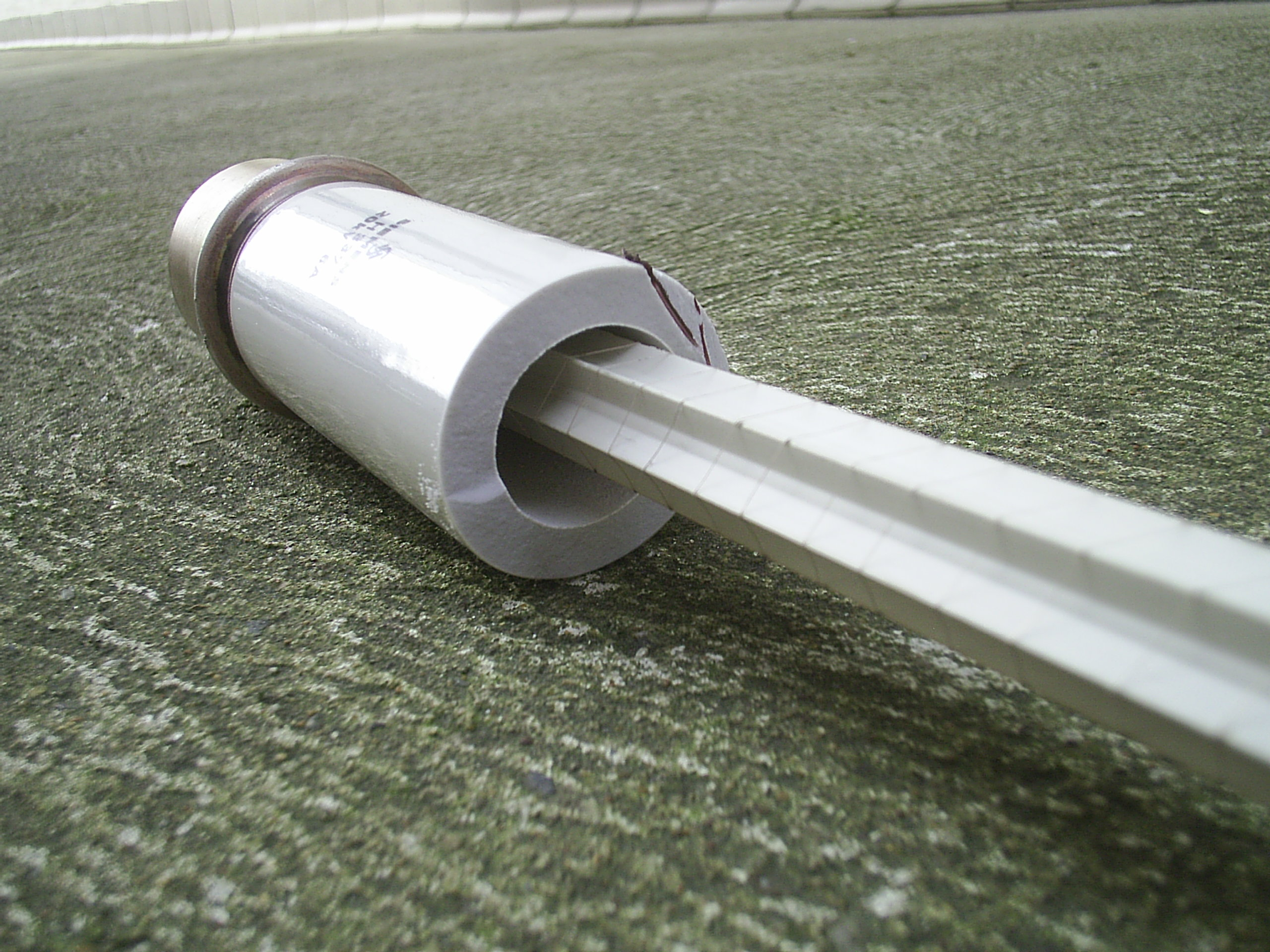 Unterer Teil einer geöffneten Mittelspannungssicherung (20kV, 6A) Auf dem Bild nicht zusehen ist,das die Sicherung komplett mit Quarzsand gefüllt ist.